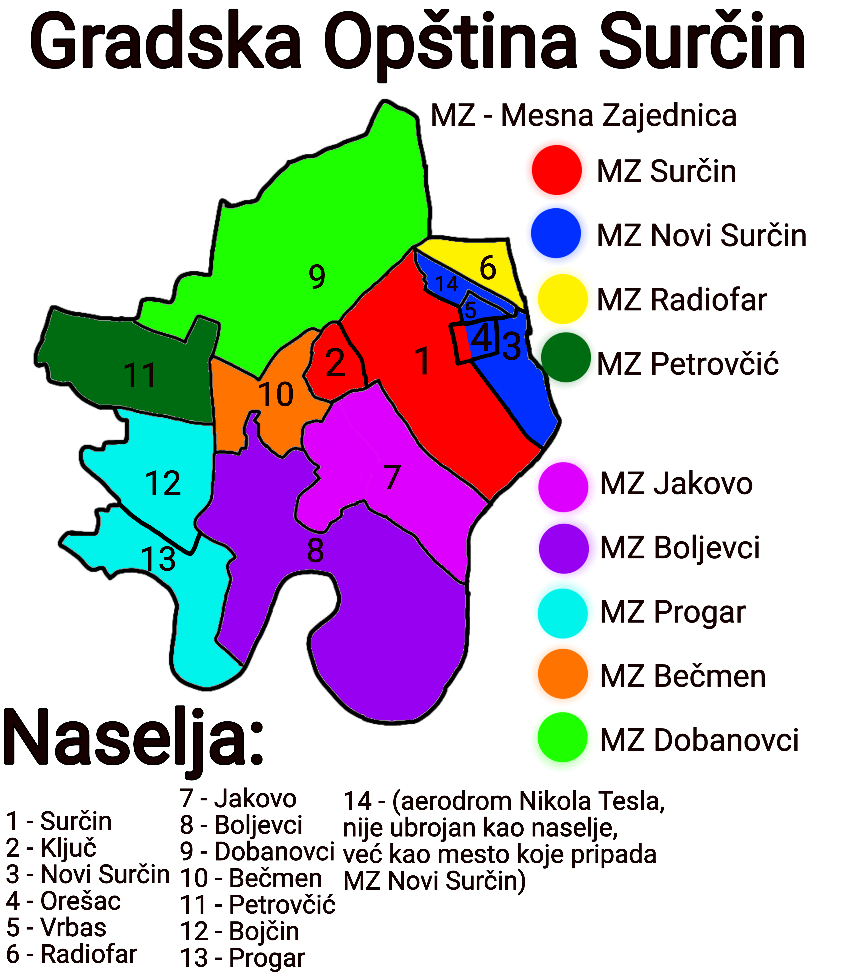 Srpski (latinica): Mapa naselja Gradske Opštine Surčin